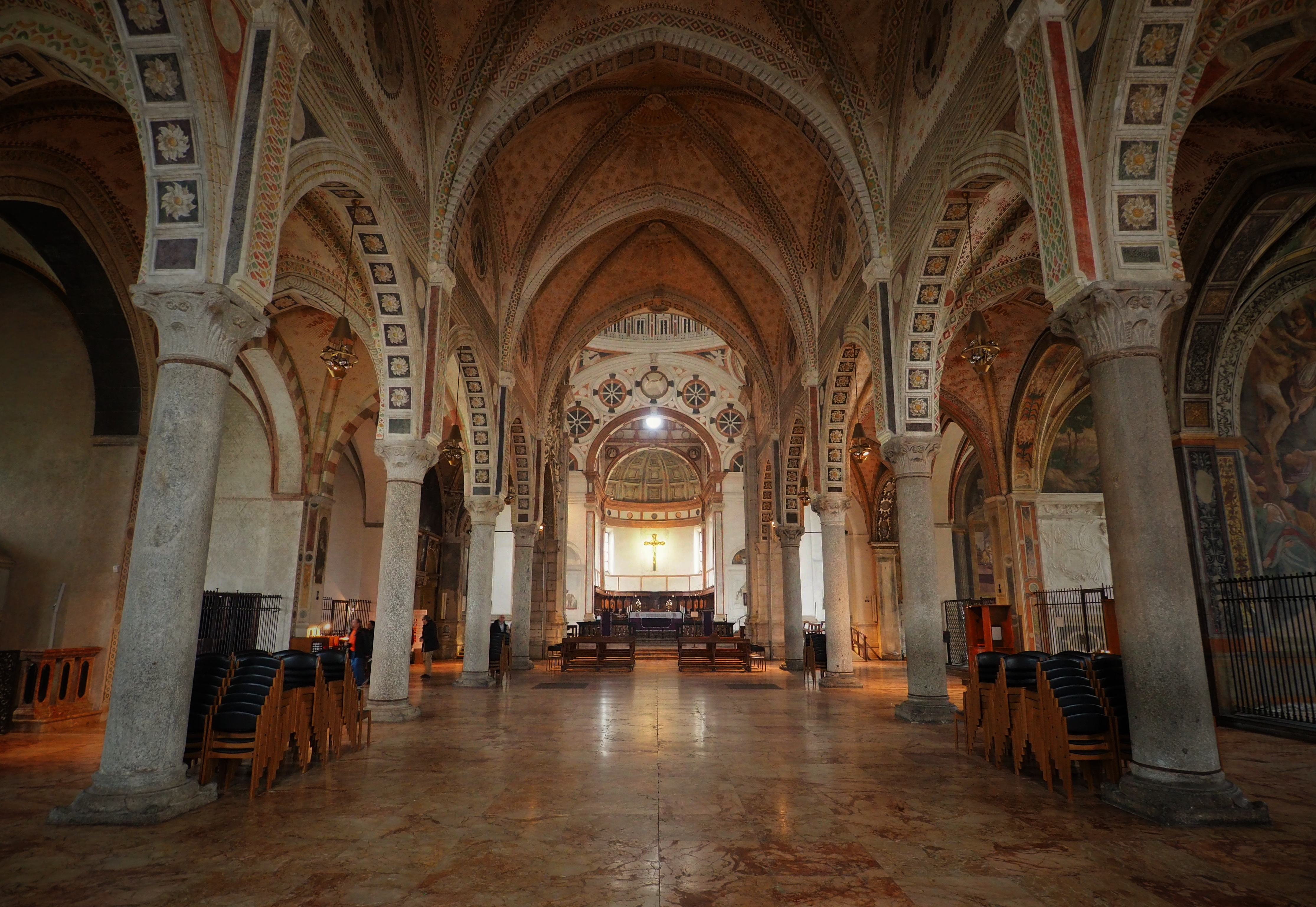 Milan, Italy